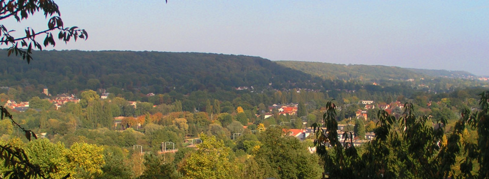 Vallée de Chevreuse at proximity of Gif-sur-Yvette